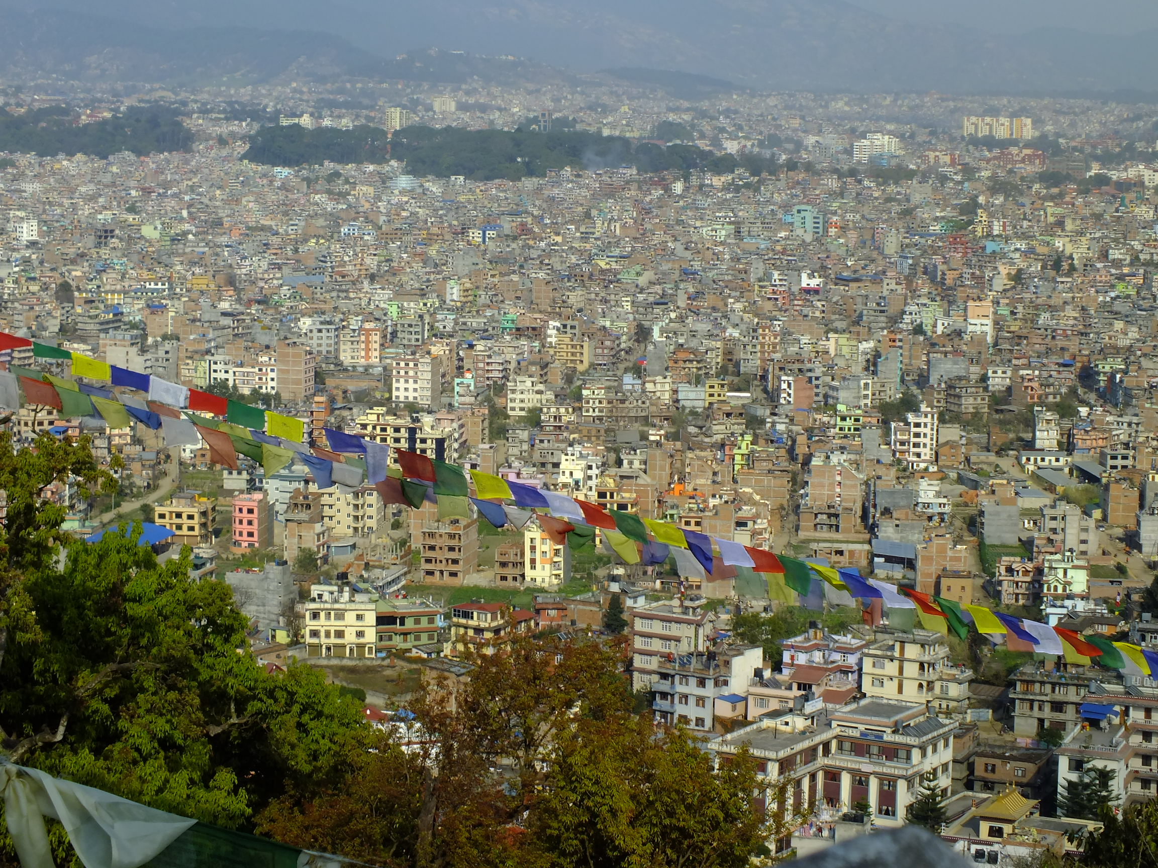 2015-03-08 Swayambhunath,Katmandu,Nepal,சுயம்புநாதர் கோயில்,スワヤンブナート